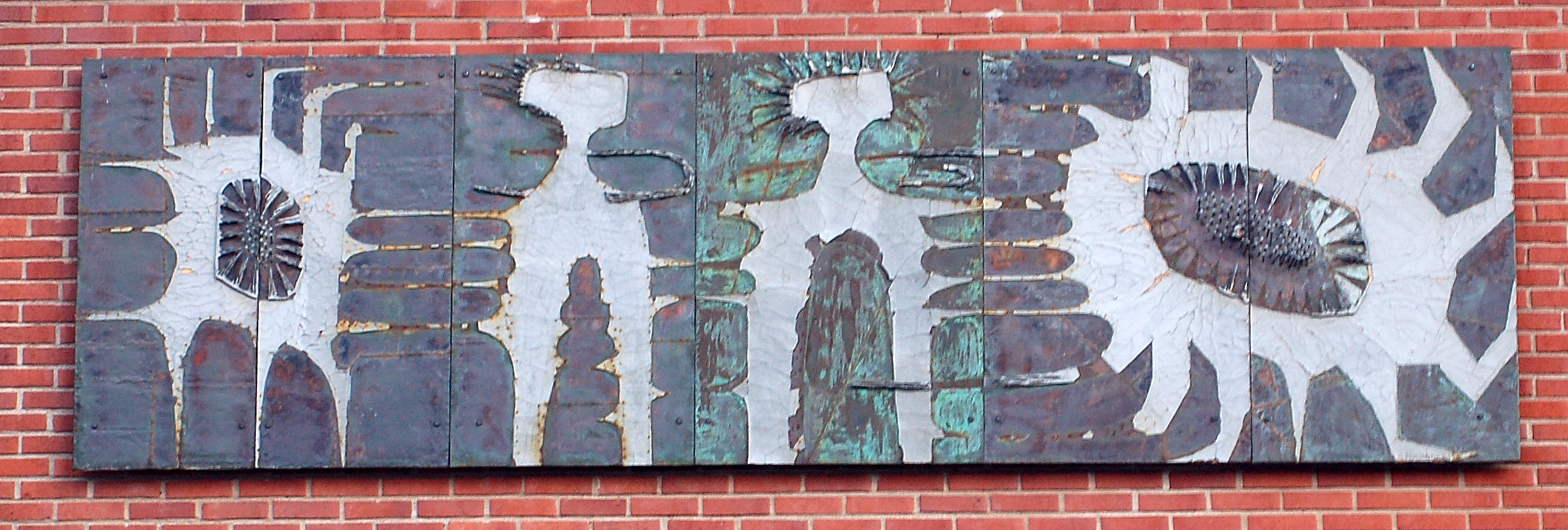 Levande bakgrund till blåsten av Gunhild Kulander, fasadutsmyckning på Hemvägen 18 i Våxnäs, Karlstad.